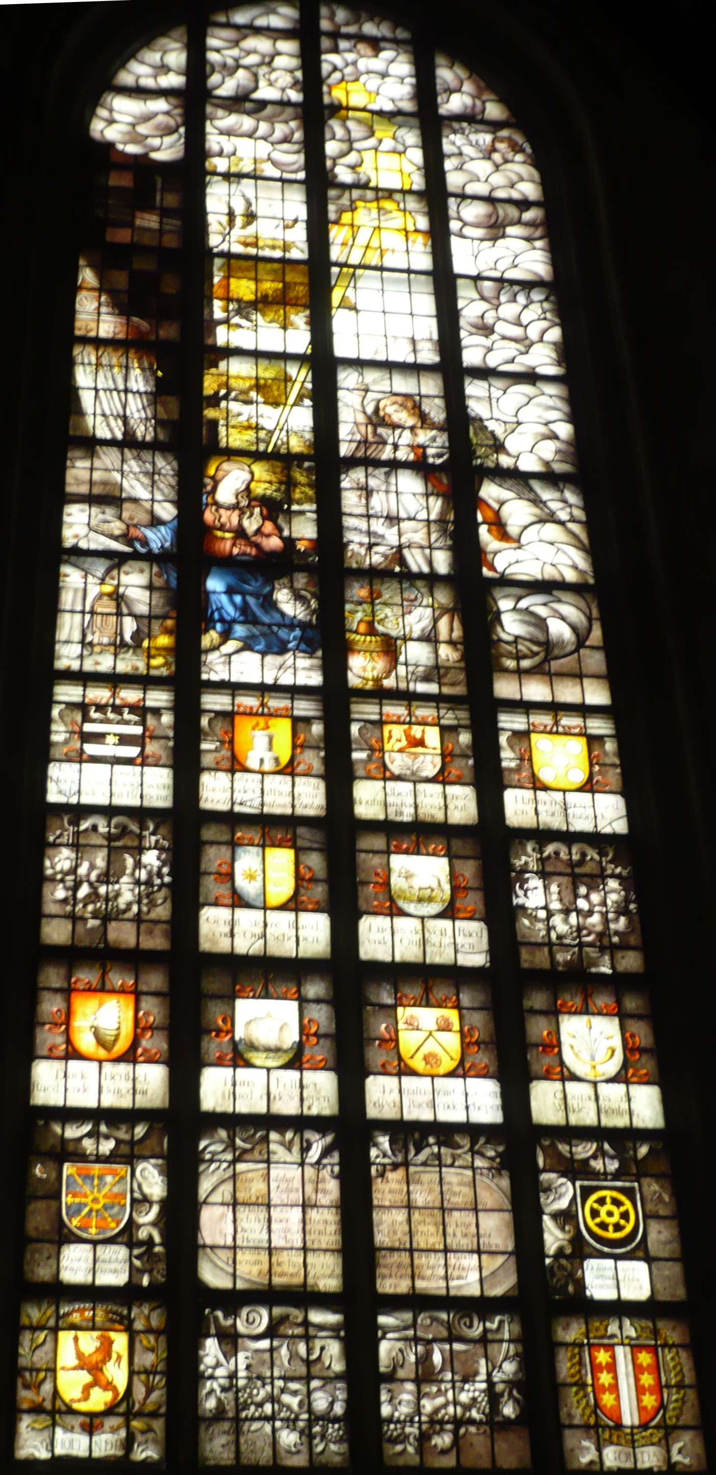 Glas 10 in Janskerk Gouda, De aankondiging van de geboorte van Jezus, Daniel Tombergen, 1655.